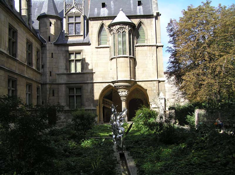 Jardins et façade de l'hôtel de Cluny Paris musée national du Moyen age